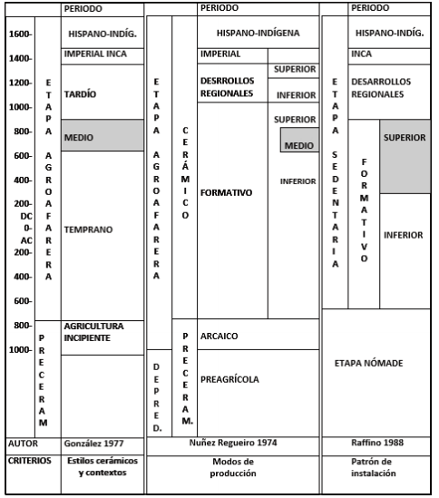 Secuencia cronologica de la arqueologia del noroeste argentino